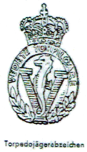 Grafische Darstellung des Torpedobootjäger-Kriegsabzeichen (Rumänien)